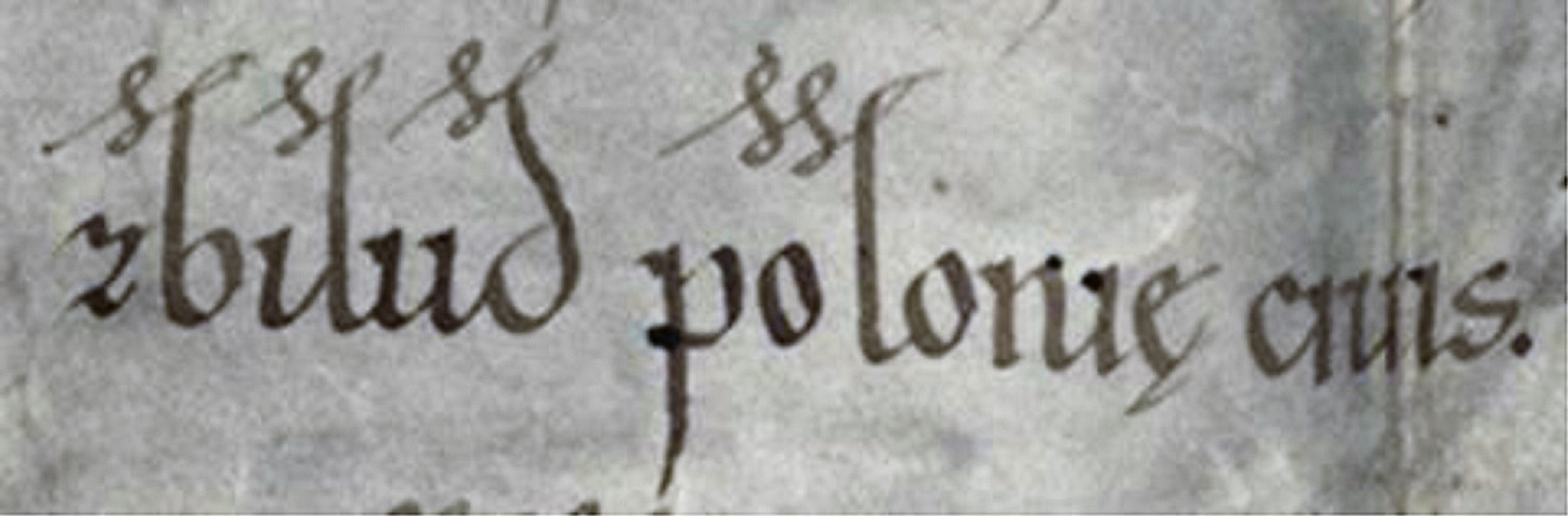 Zbilud polonie civis (Zbylut obywatel Polski) Dokument fundacyjny klasztoru cystersów w Łeknie - najstarszy zapis dotyczący obywatelstwa polskiego (dotyczący Zbyluta z Panigrodza)